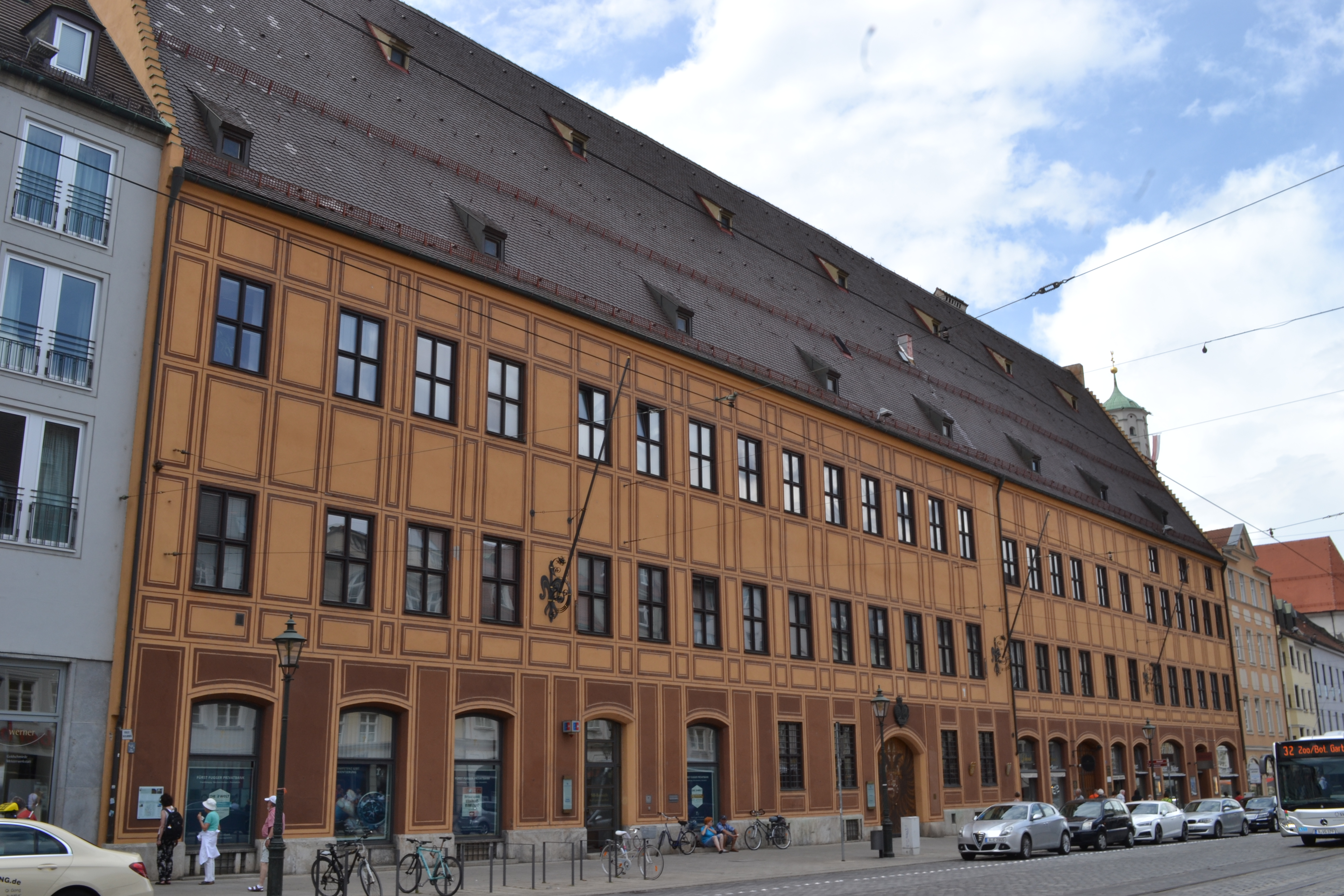 Der fuggersche Stadtpalast in der Maximilianstraße in Augsburg.